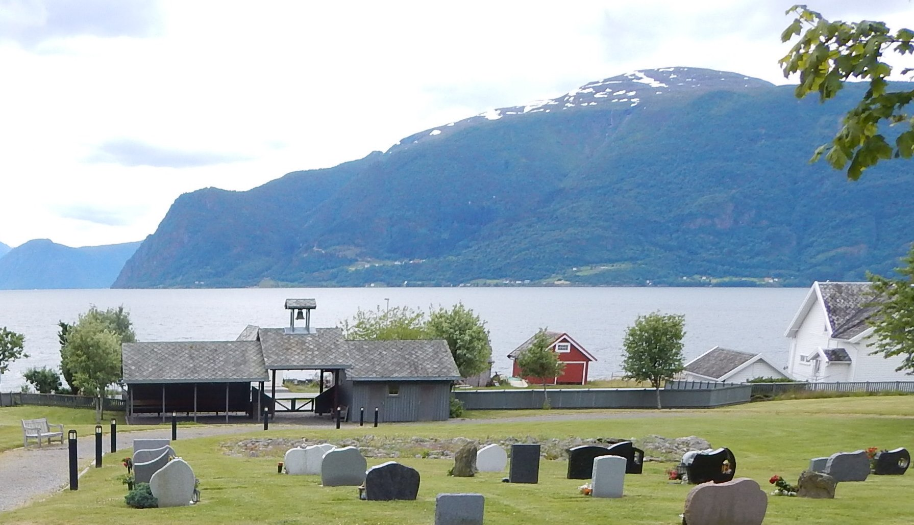 Husabø gravplass